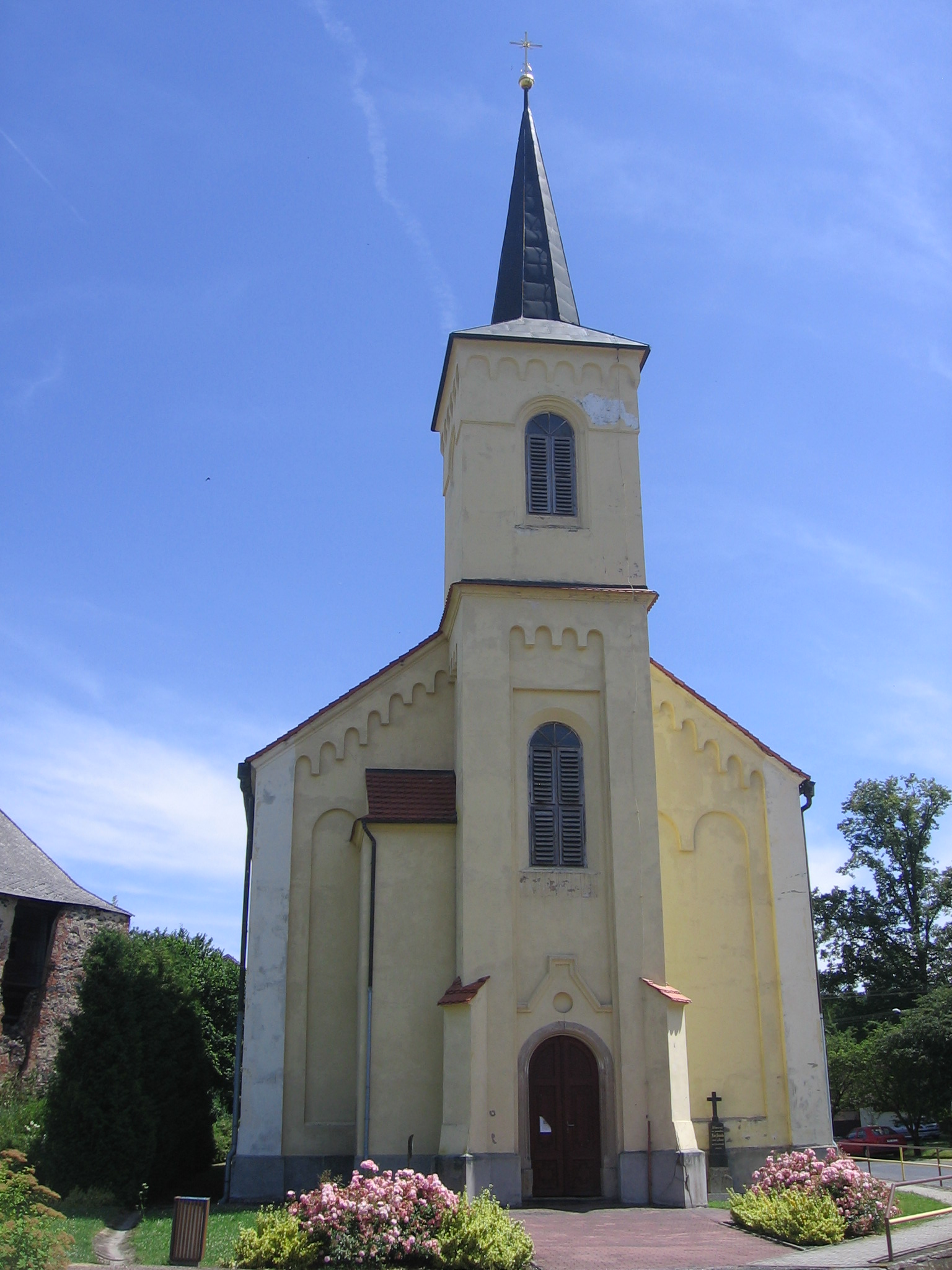 Pohled od západu na kostel svatých Cyrila a Metoděje, střed obce, Řenče.